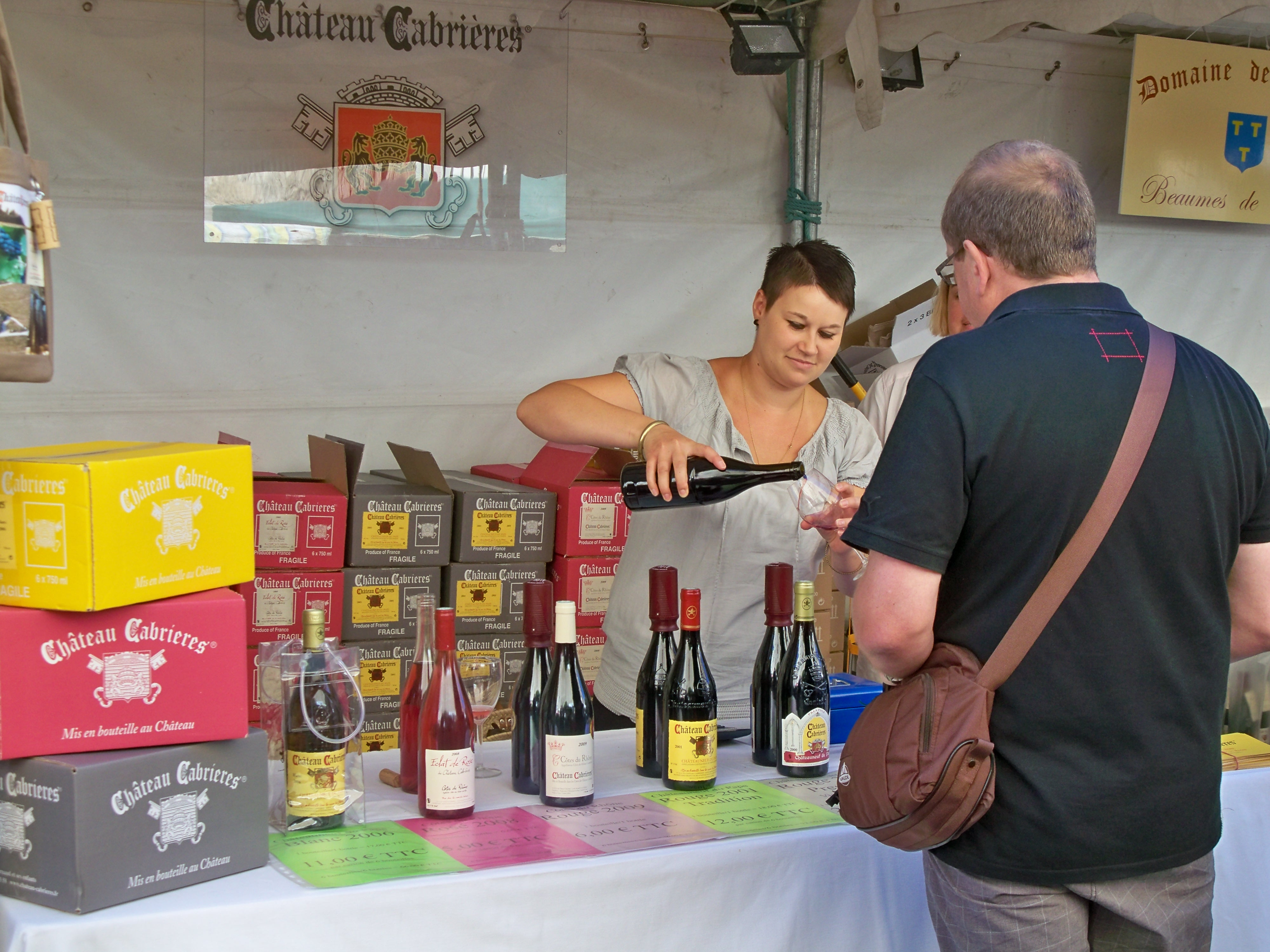 Stand à la Fête de la Véraison de Chateauneuf du Pape, Vaucluse, France